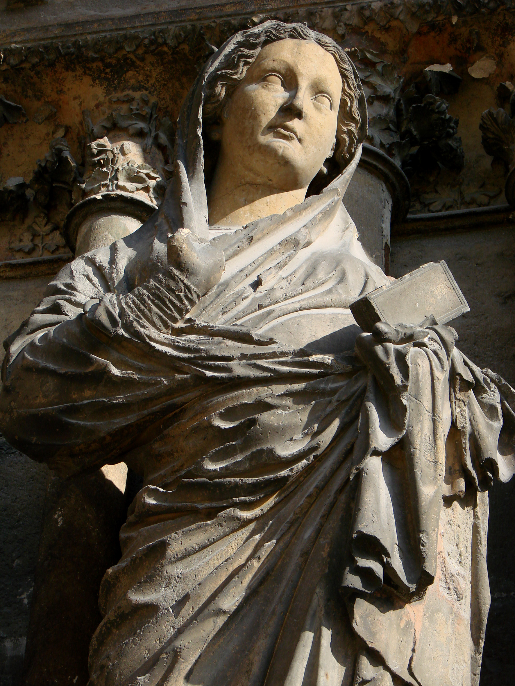 Vierge du groupe de la Visitation, portail central de la façade, cathédrale Notre-Dame de Reims, XIIIème siècle.